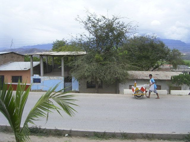 Bagua Grande, Provincia de Utcubamba, Región Amazonas, Perú